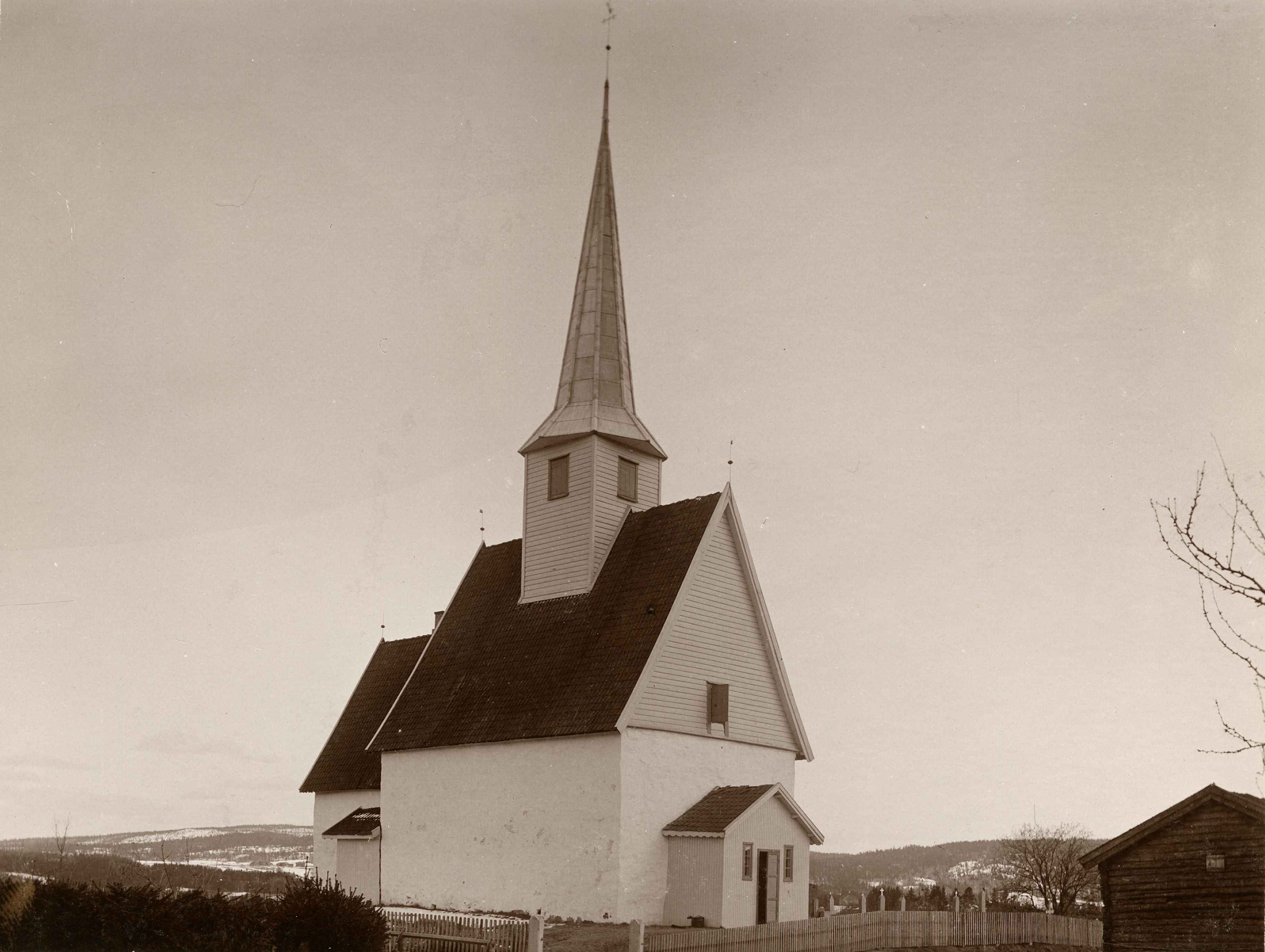 Frogner kirke, gamle i Frogner, Akershus Kirken brant i 1918, gjenoppbygget 1981.